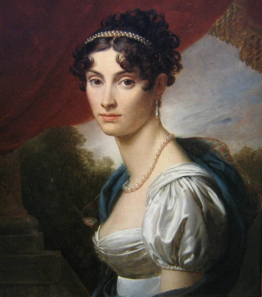 Princess Maria Kochubeylabel QS:Lru,"Мария Васильевна Кочубей, урождённая Васильчикова (1779-1844), статс-дама, жена В.П.Кочубея." label QS:Len,"Princess Maria Kochubey"